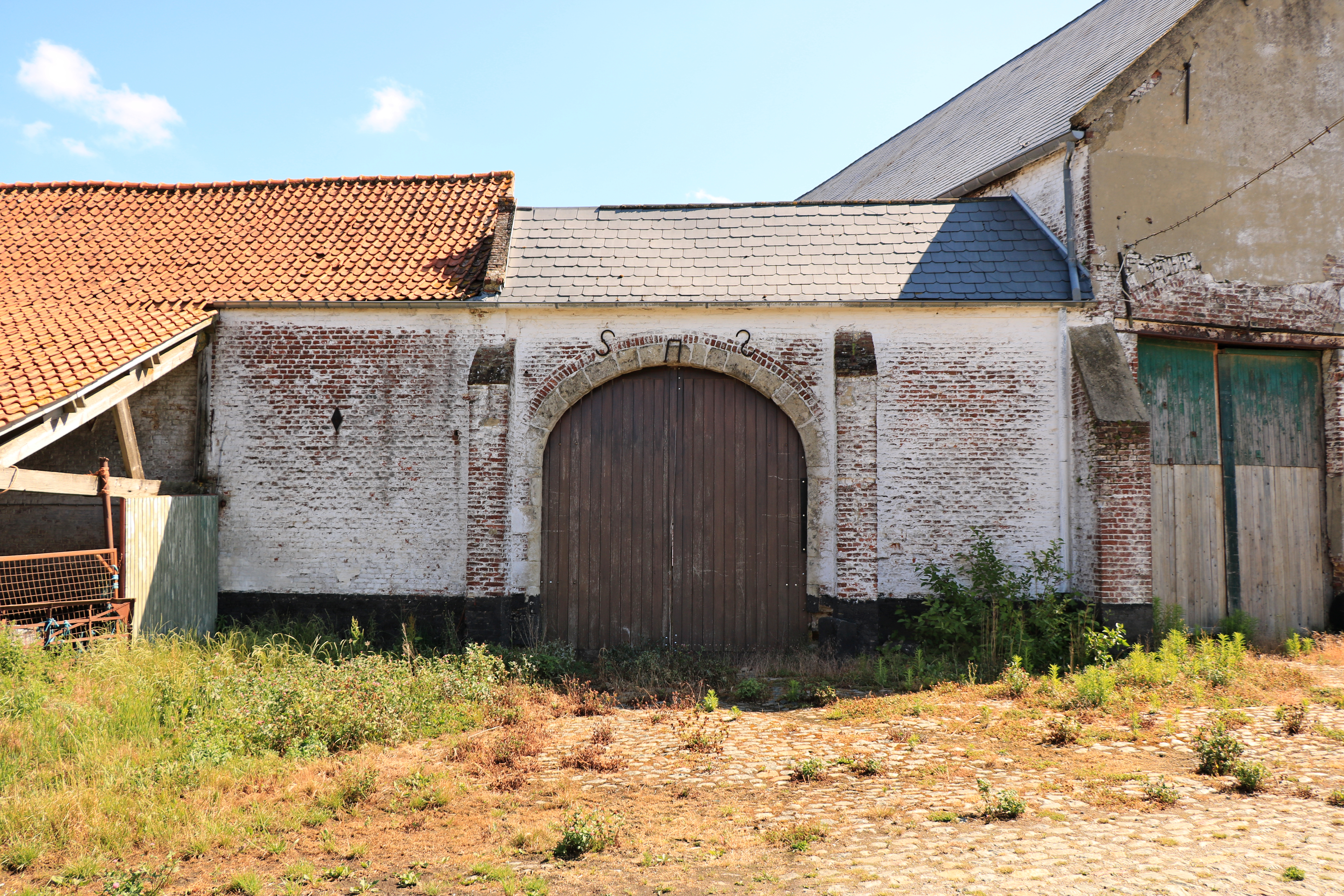 Belgique - Brabant wallon - Louvain-la-Neuve - Ferme de Lauzelle